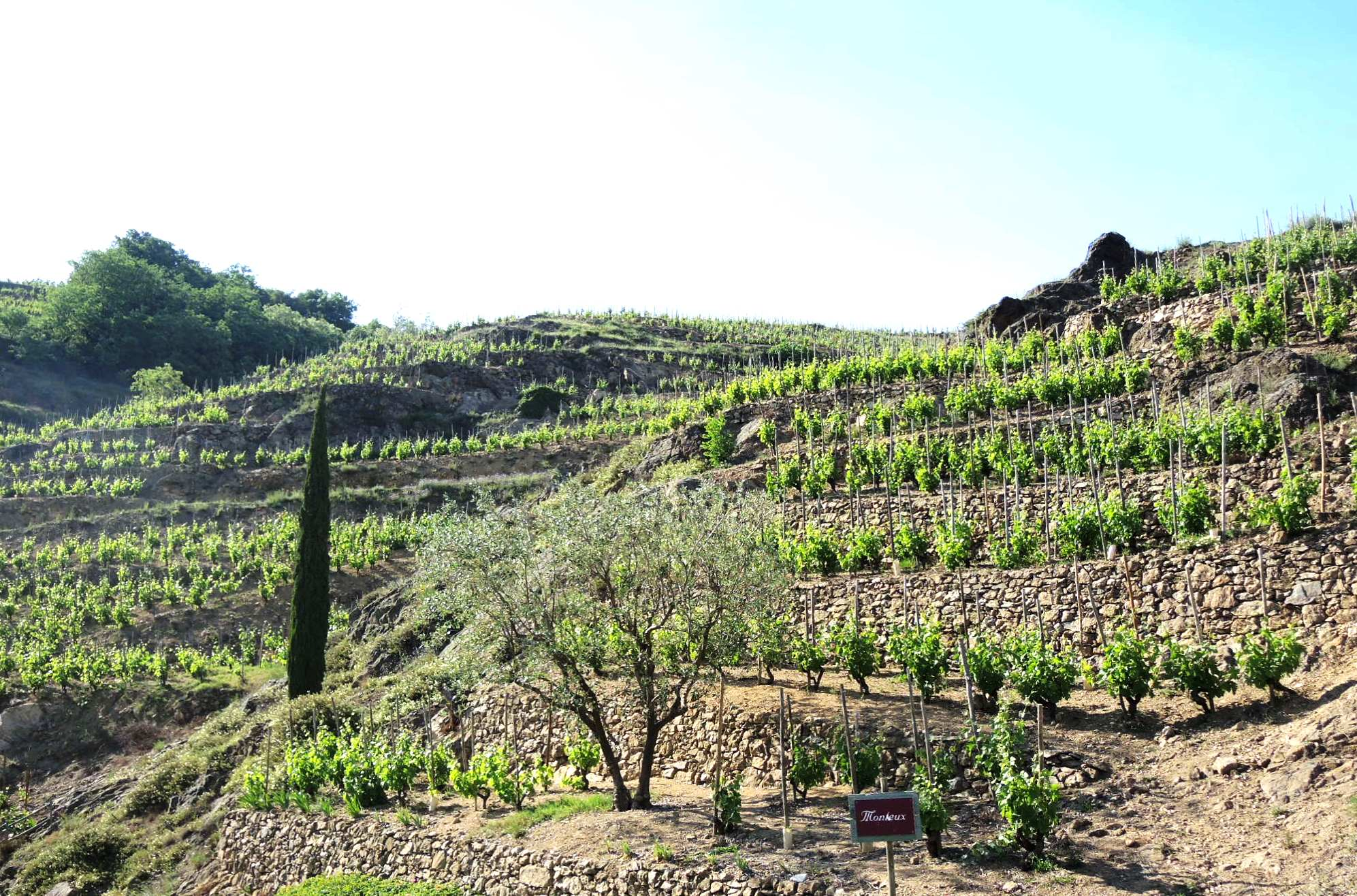 Saint-Désirat détail